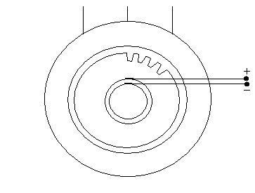 Oʻzbekcha/ўзбекча: Turbogenerator sxemasi.